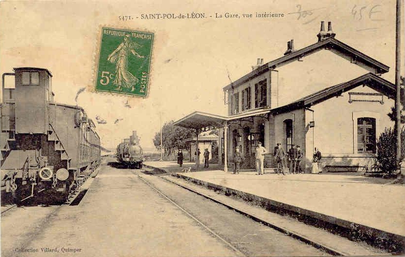 Gare de Saint-Pol-de-Léon (Finistère). Le chemin de fer a permis d'exportation des légumes dans toute la France et en Europe.